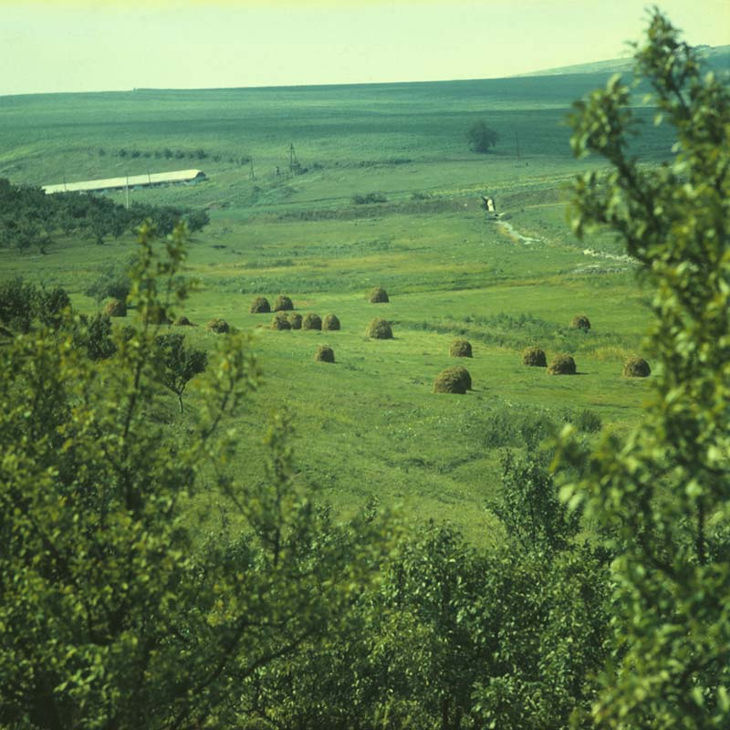 Orhei district.